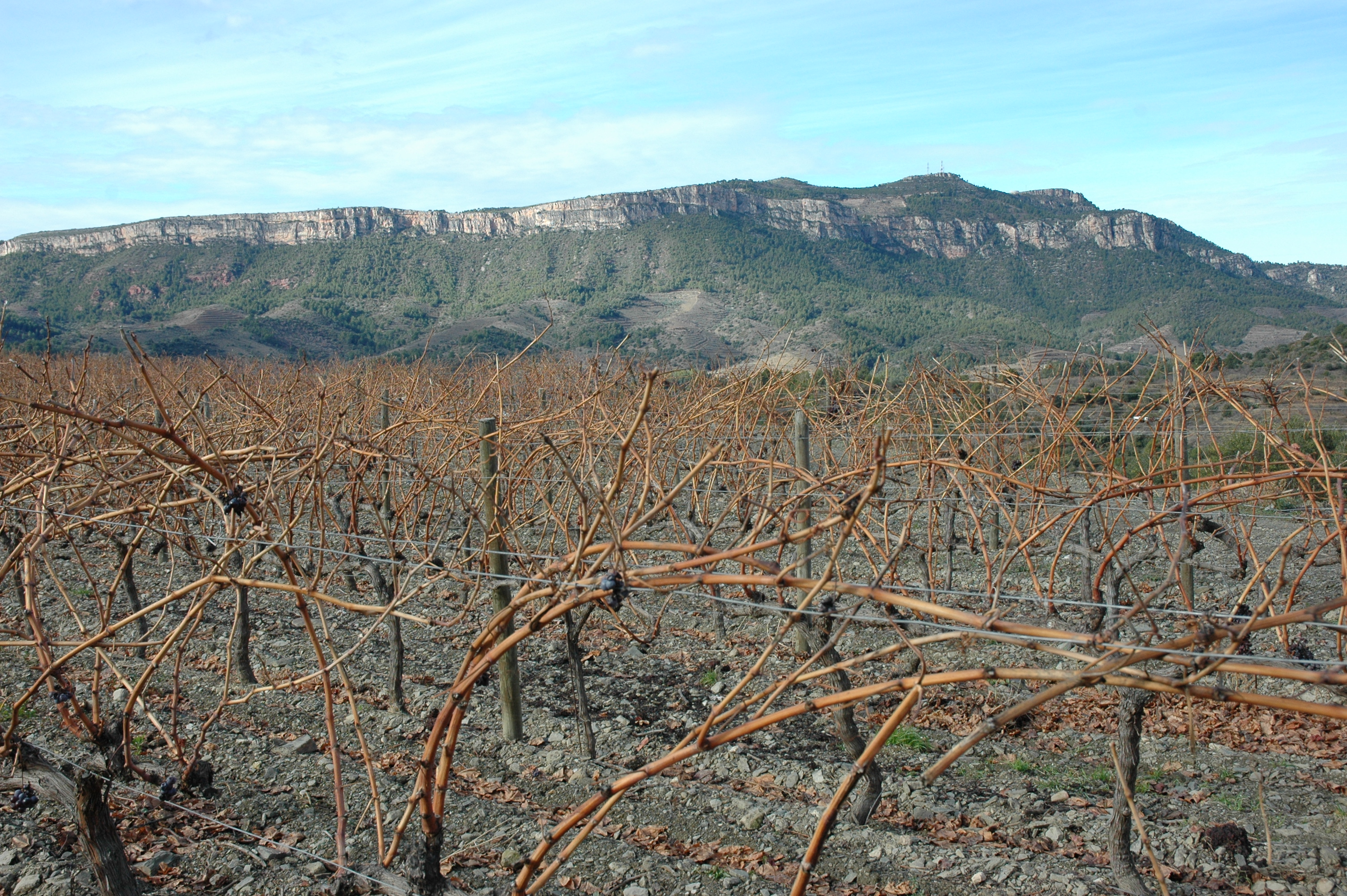 Serra dels Llangossets al Priorat